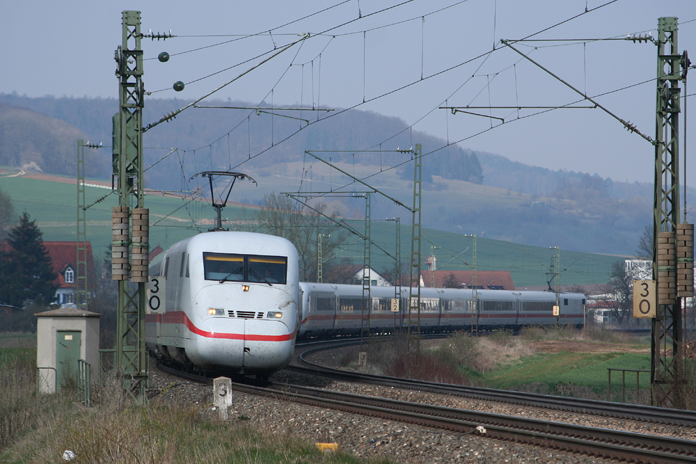 Eine Doppeltraktion ICE 2 zwischen Wettelsheim und Treuchtlingen